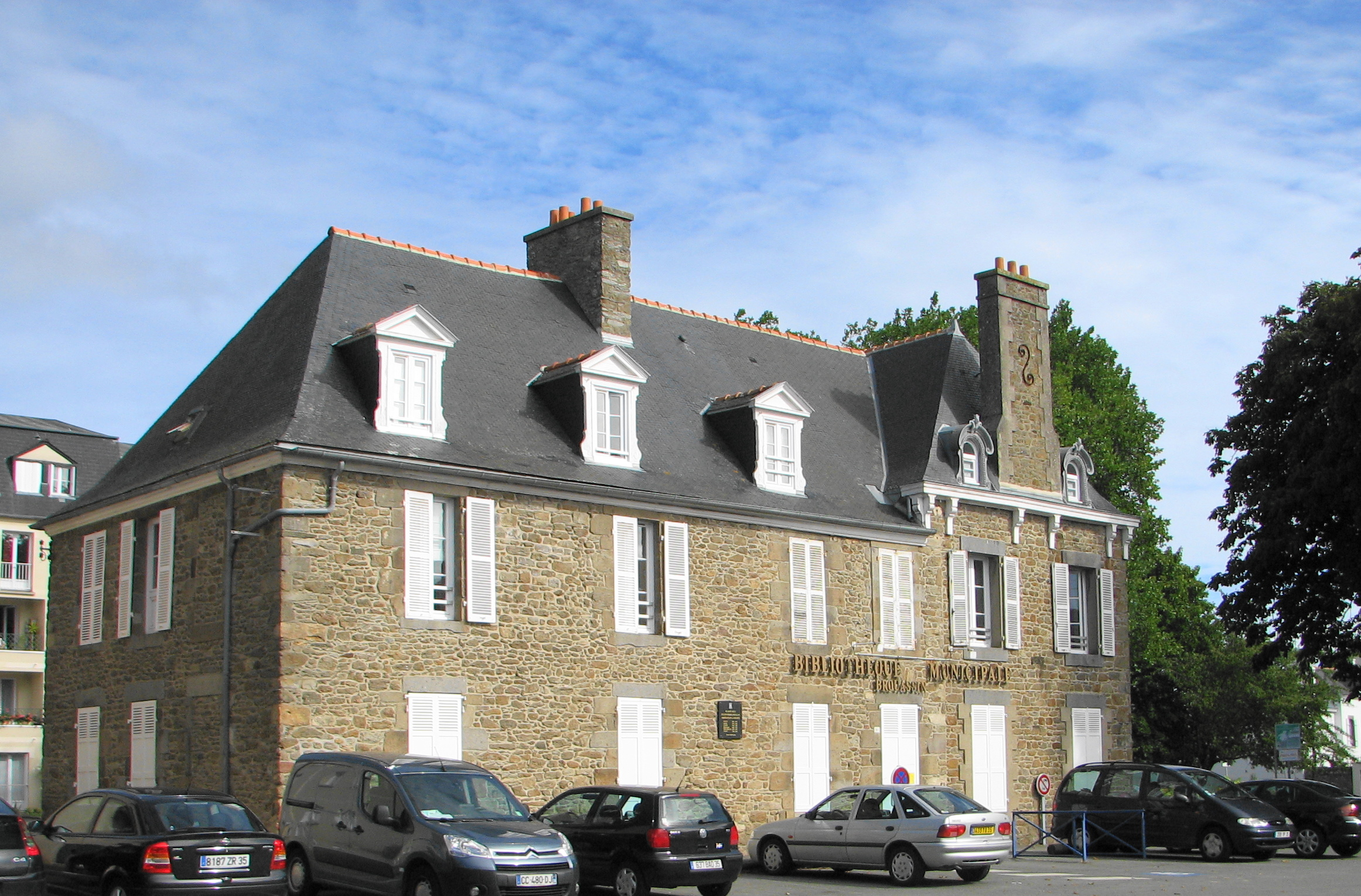 Bibliothèque annexe de Paramé, à Saint-Malo, ancienne maison des frères Ruellan.